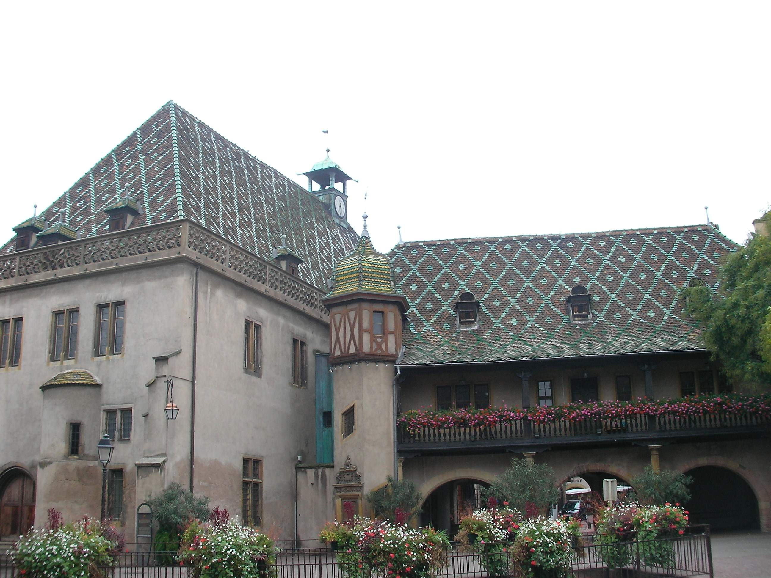 Koïfhus (ancienne douane) au 29 Grand-Rue à Colmar (Haut-Rhin, France).